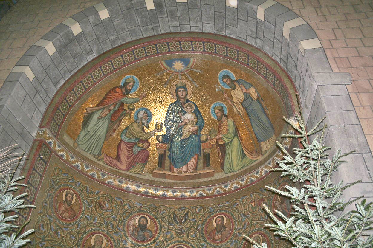 Benediktinerabtei Maria Laach: Mosaik aus enger Säitenapsis vun der Abteikierch Maria Laach.